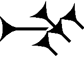 Cuneiform sign